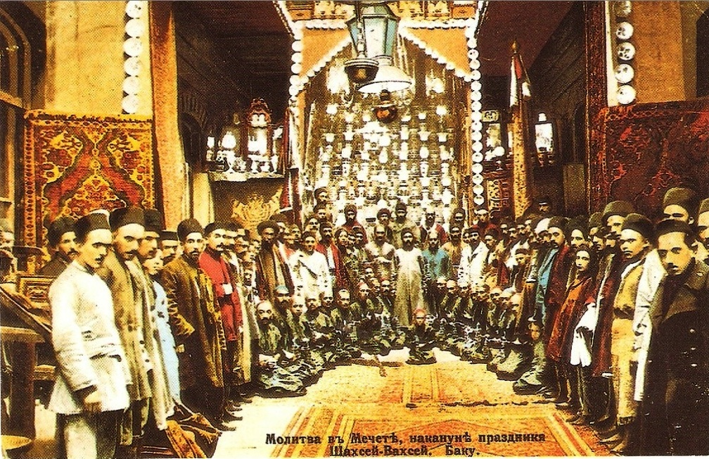 Шахсей-вахсей. Баку